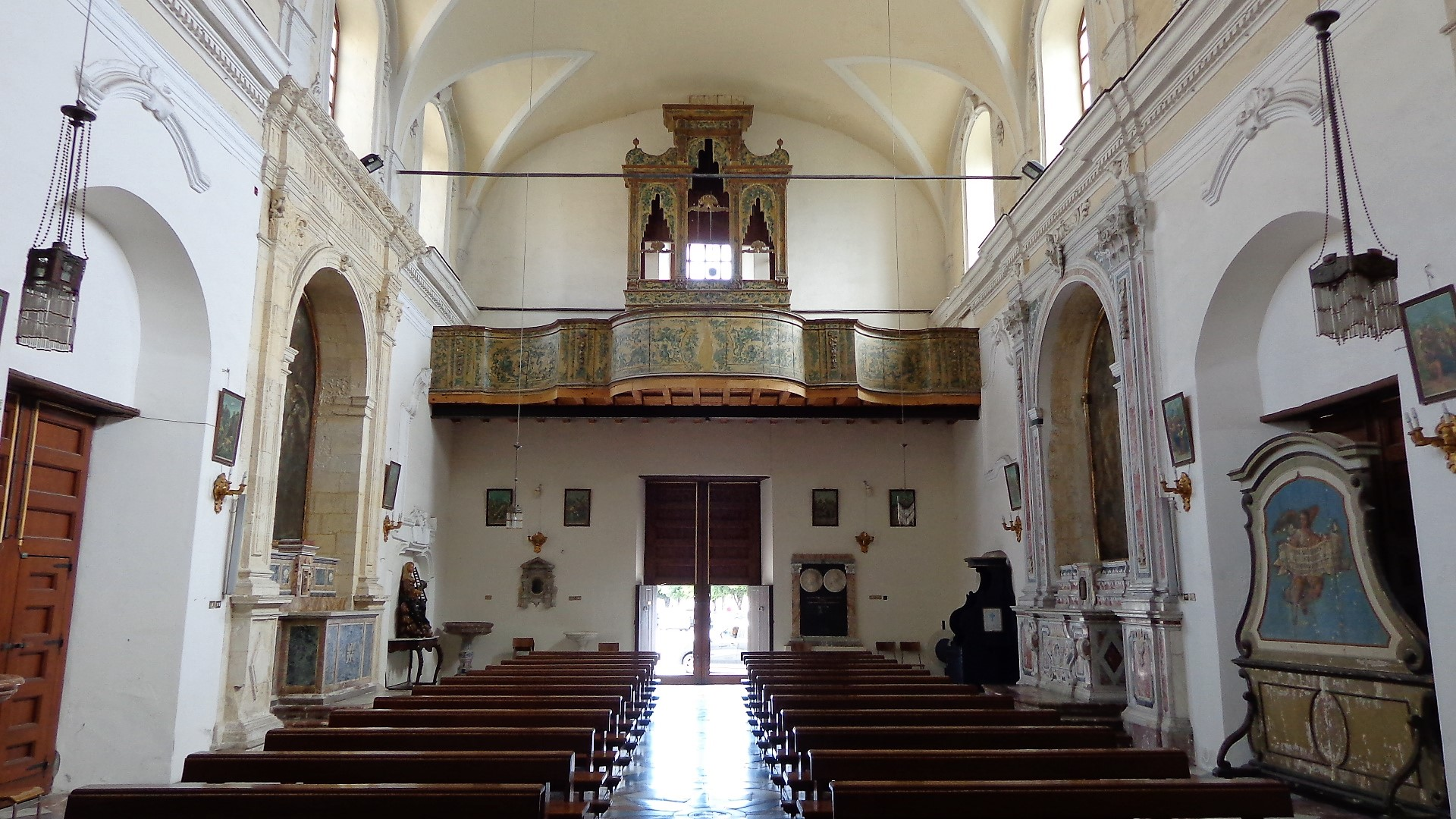 Cantoria